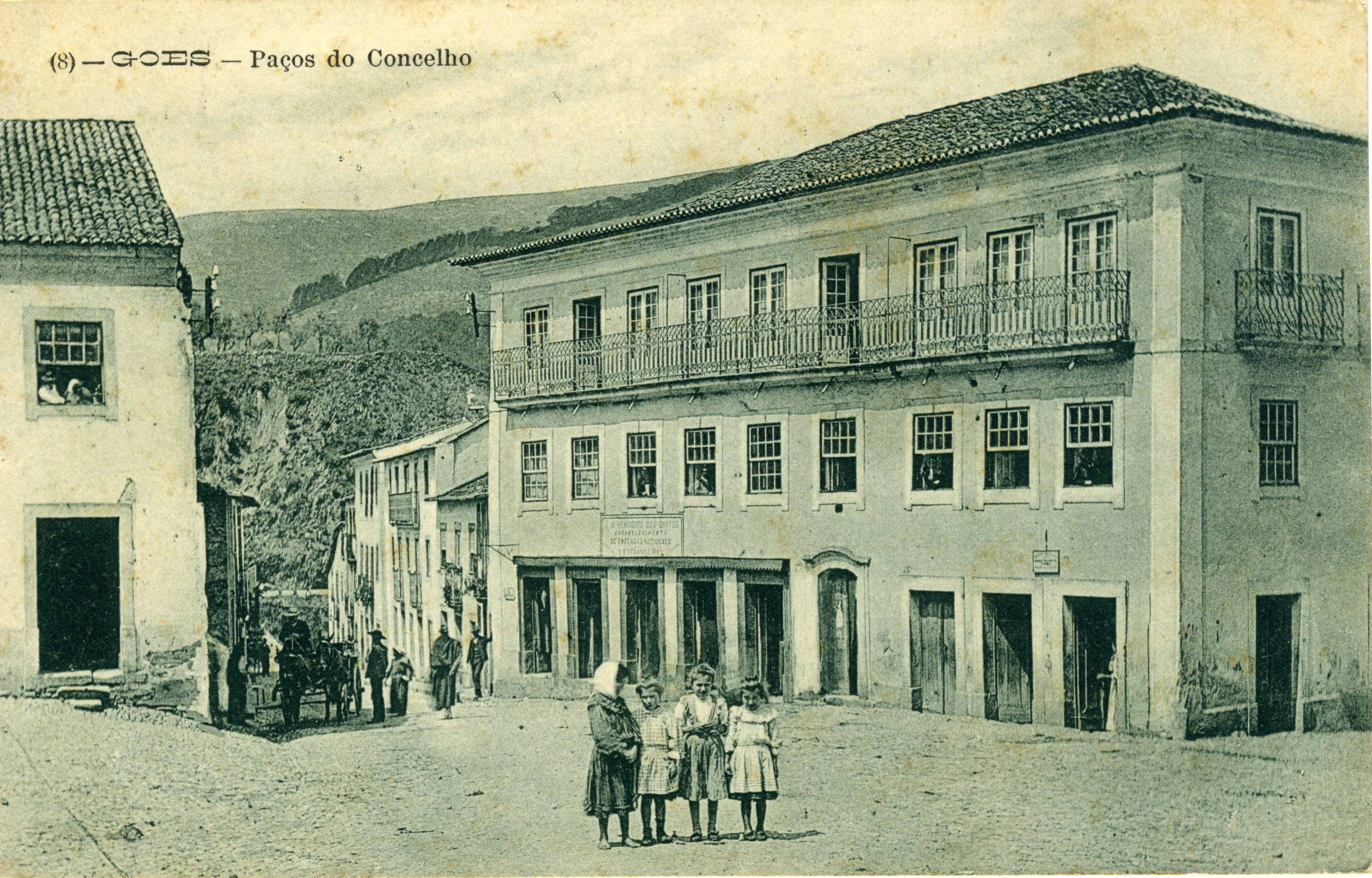 postal antigo : Goes paços do Concelho, edição Claudino N. Campos